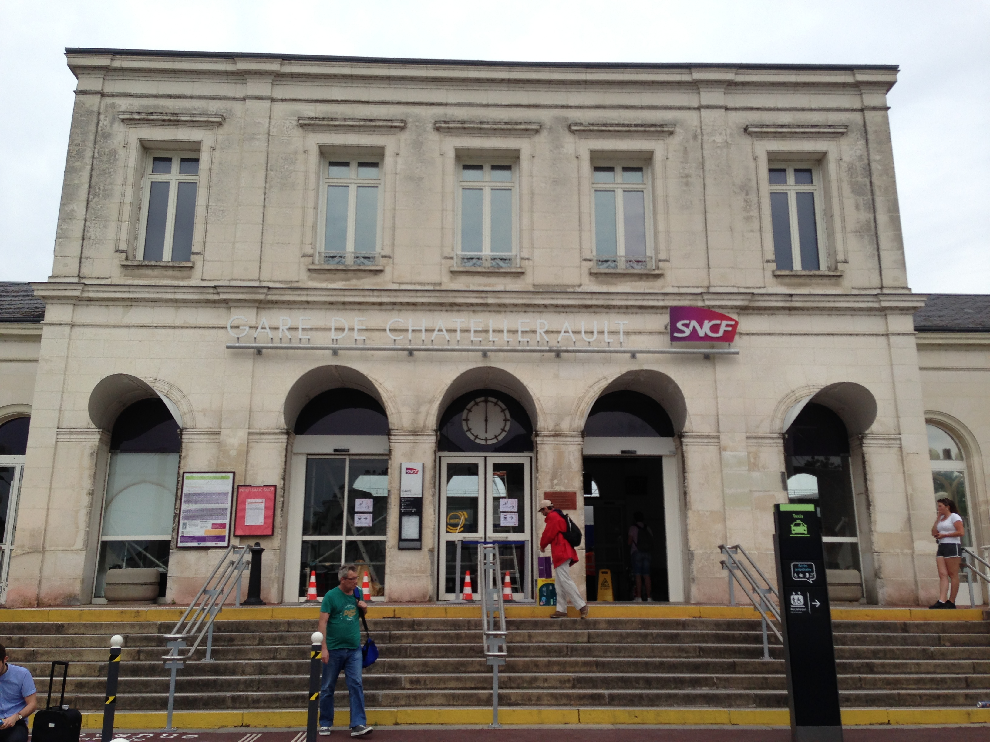 Gare de Châtellerault en Juin 2017